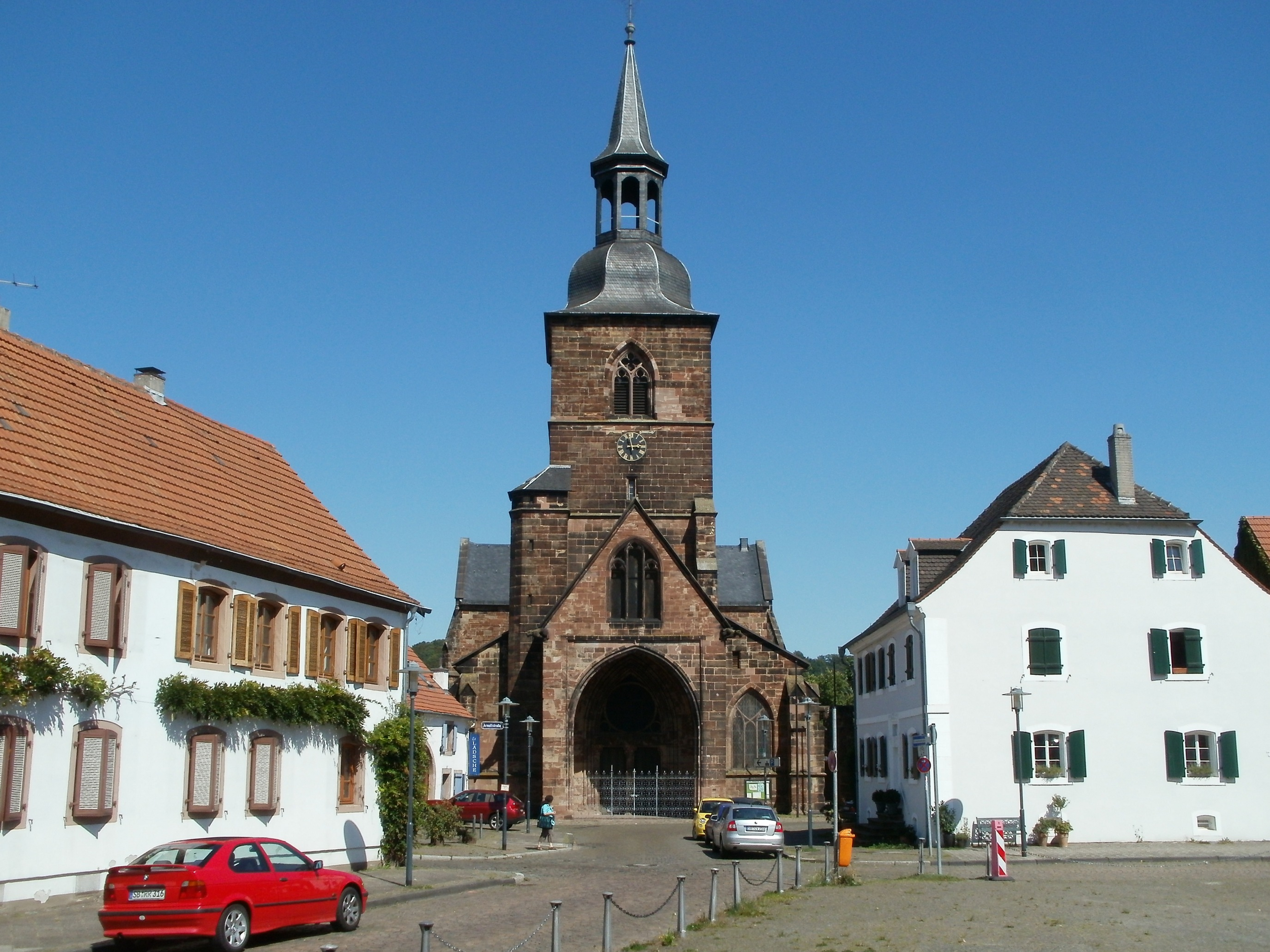 Stiftskirche St. Arnual